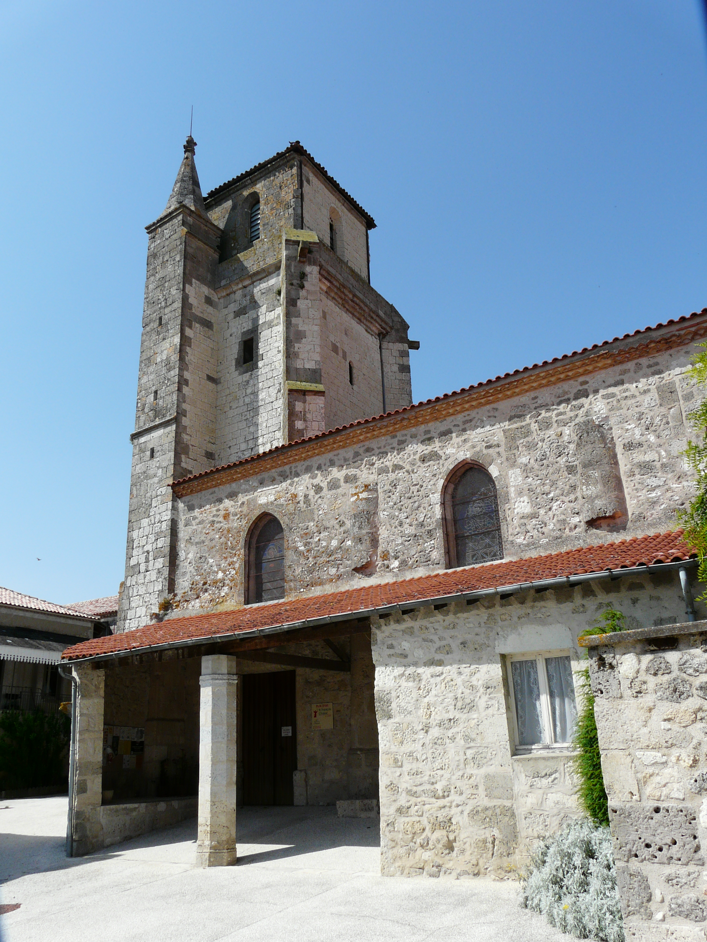 L'église Notre-Dame, Montagnac-sur-Auvignon, Lot-et-Garonne-France.